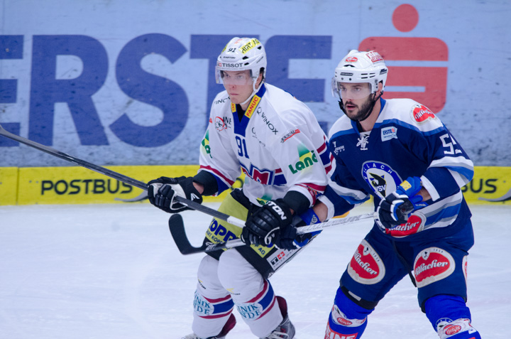 _DSC4552.jpg